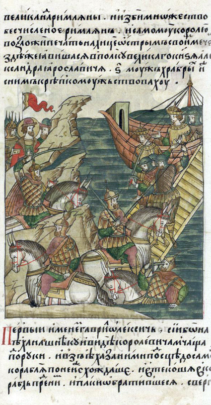 Лицевой летописный свод. Невская битва большая с римлянами; и убили новгородцы множество бесчисленное римлян; и самому королю князь Александр сделал шрам на лице острым своим мечом. Тогда же проявили себя в войске великого князя Александра Ярославовича 6 храбрецов, которые с ним рядом мужественно сражались. Первому имя Гаврила Алексич; он увидел, как уводили королевича под охраной на корабль; и взъехал Гаврила за ними на коне до самого корабля по доске, перекинутой на корабль; и неприятели вошли в корабль перед ним, а затем, обратившись, сбросили